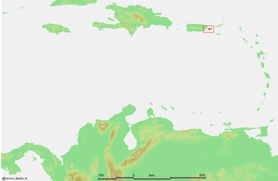 Caribbean - Vieques.PNG